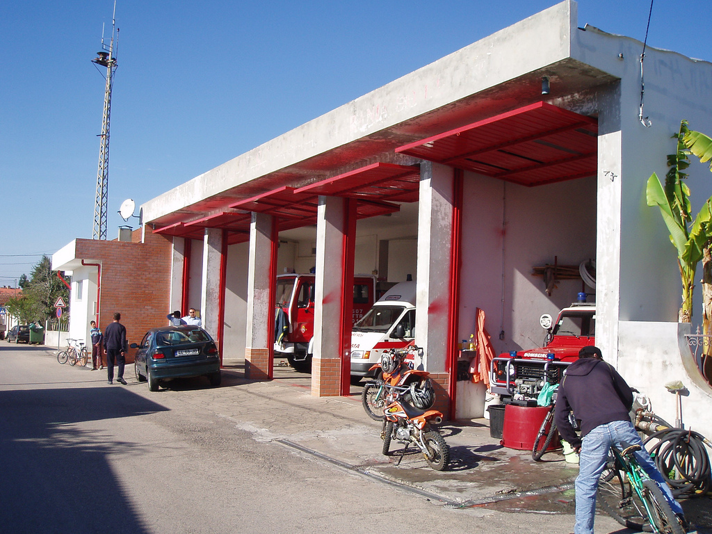 Quartel da 4ª Secção dos Bombeiros Voluntários de Soure, Granja do Ulmeiro